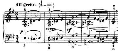 Compassos iniciais do segundo movimento da Sonata Op. 14 número 1 de Beethoven